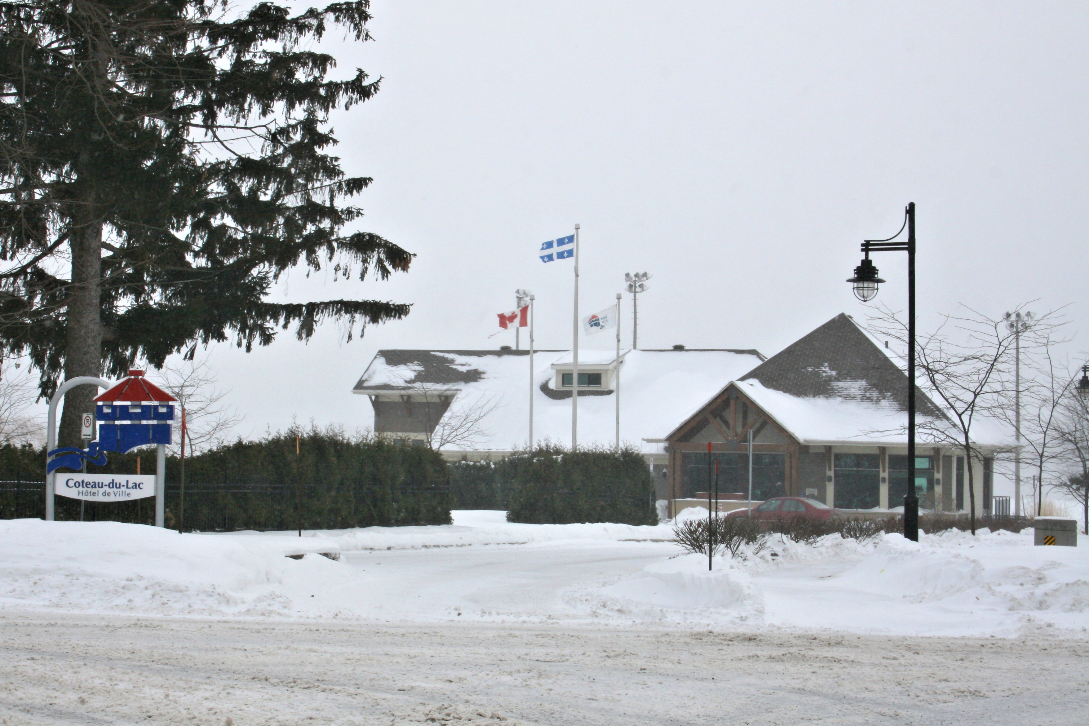 Coteau-du-Lac, Quebec, Canada